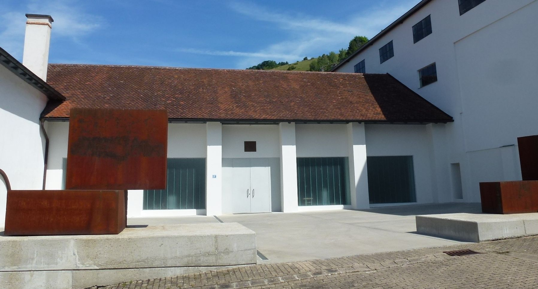 Skulpturenpark von Alf Lechner auf dem ehem. Hüttenwerksgelände